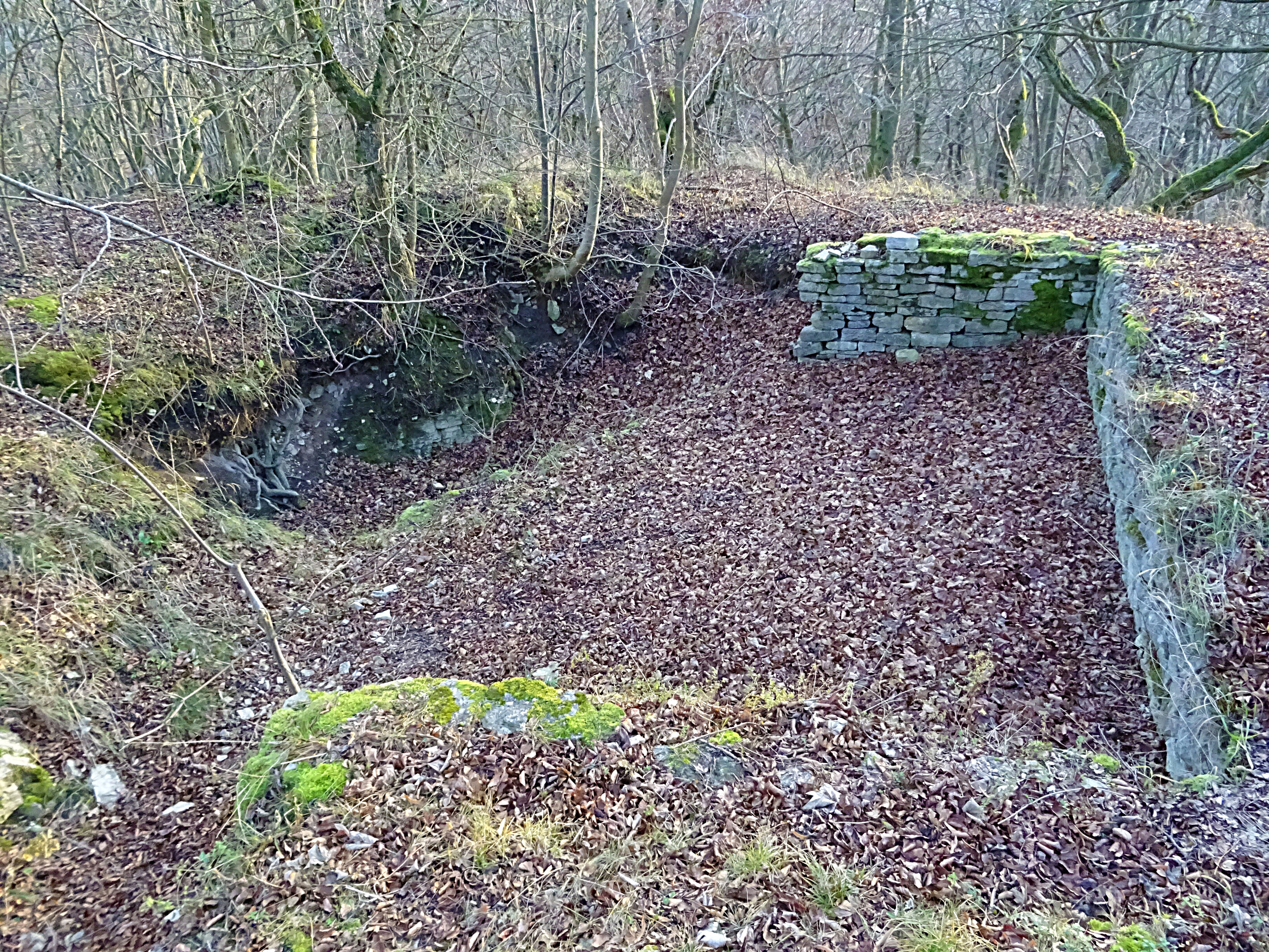 Hasenburg (Eichsfeld), ehemaliges Haus des Verwalters